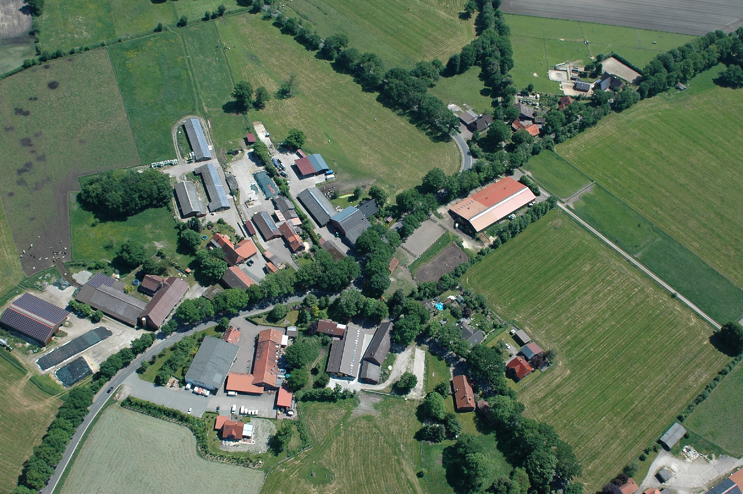 Luftbild von Elmlohe. Etwa in der Bildmitte die Einmündung der Kührstedter Straße in die Dorfstraße. Aus Serie: Fotoflug vom Flugplatz Nordholz-Spieka über Cuxhaven und Wilhelmshaven